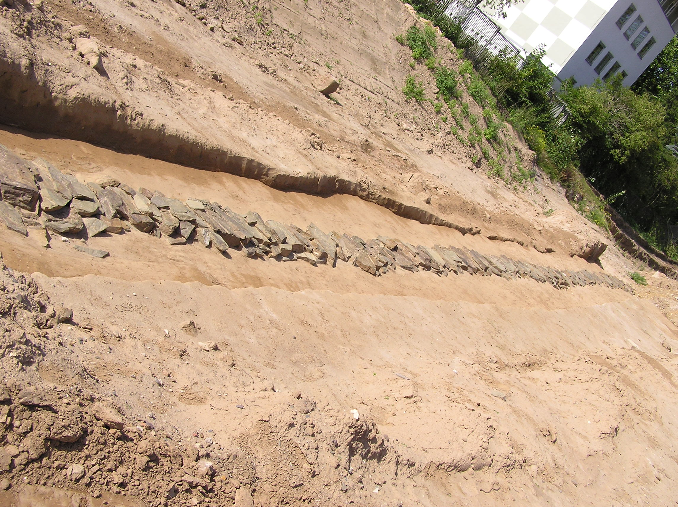 der westliche Kanal der beiden Nord-Süd-Kanäle des vicus bonnensis (zivile römische Siedlung in Bonn), die in einen breiten Kanal mündeten, der zum Rhein führte. Hier ist die Gewölbedecke des 0,5 m breiten Kanals zu sehen. Der Kanal lag ungefähr 1,3 m unter dem römischen Laufniveau und war wahrscheinlich mit Holz ausgekleidet. Er besaß keinen befestigten Boden.